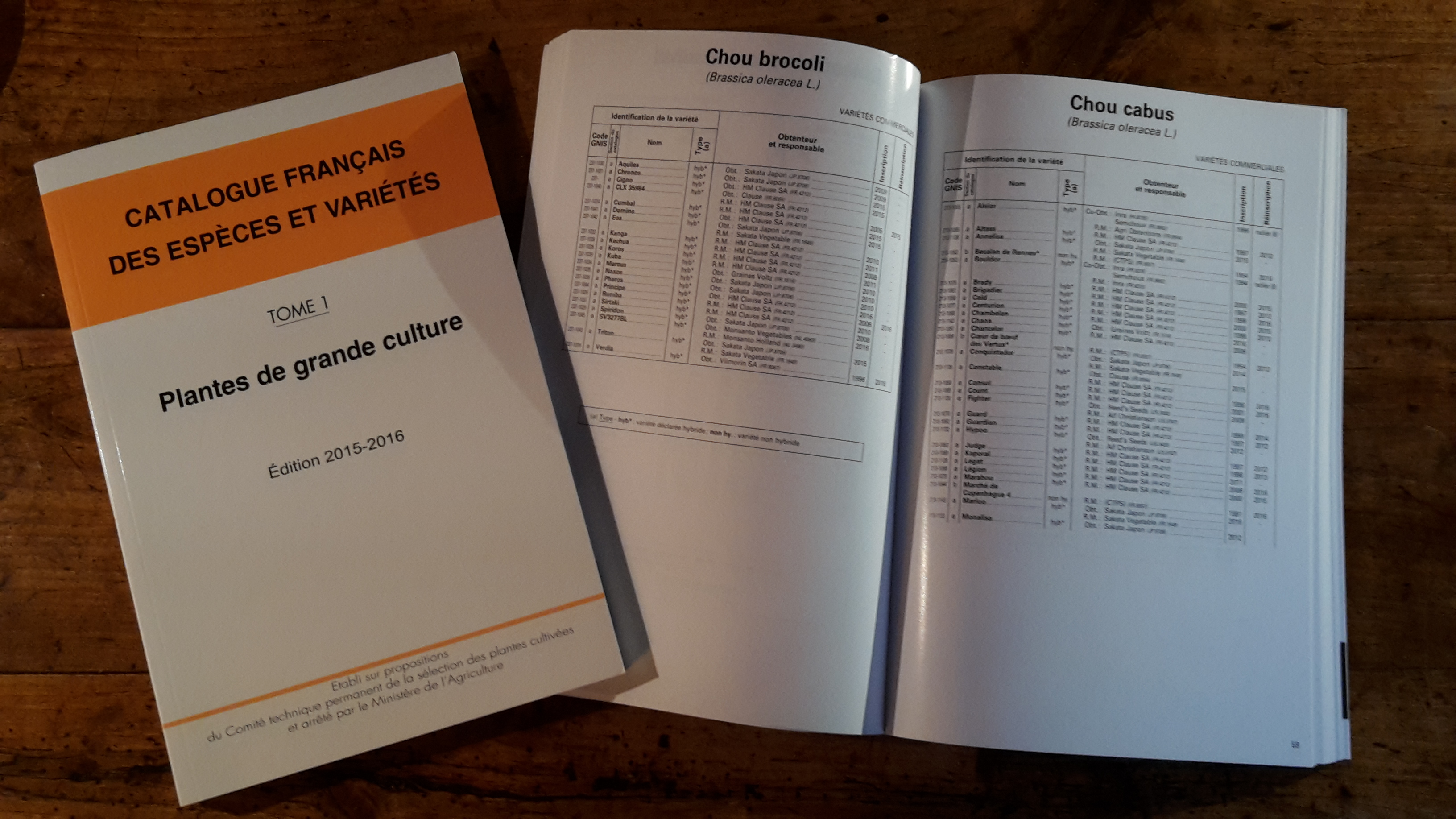 Catalogue officiel français des espèces et variétés. Edition 2015-2016 Sedis